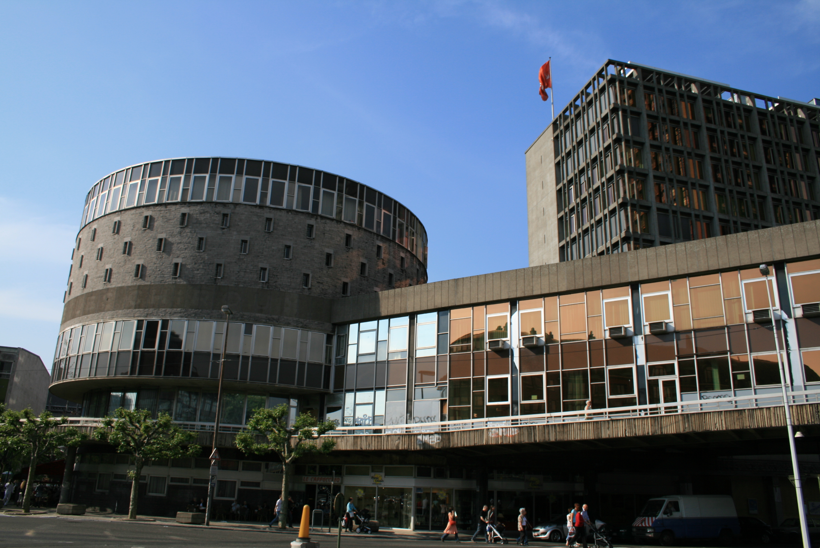 Les Chiroux